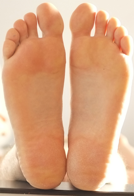 Подошвенная сторона стоп человека (мужчины).